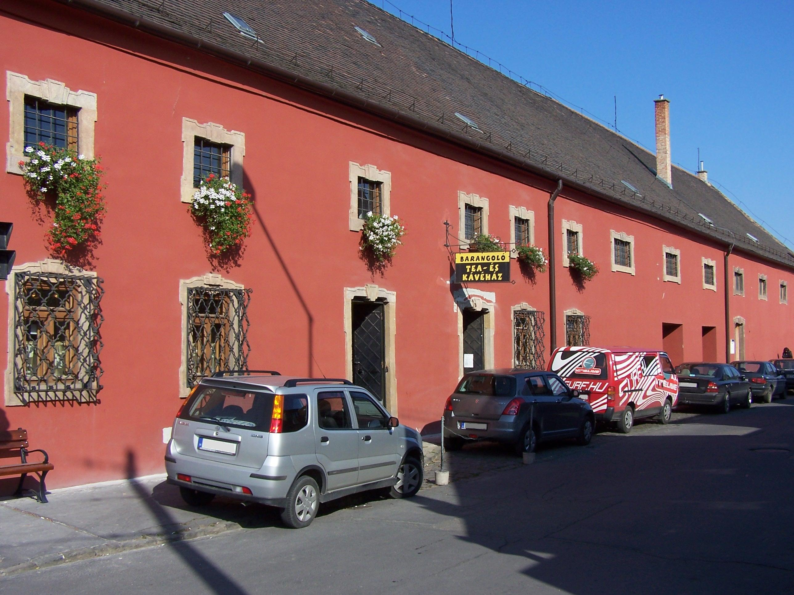 Magtár, ún. Vörös-ház (Vác, Csányi László dr. körút 52.) This is a photo of a monument in Hungary, Identifier: 7498